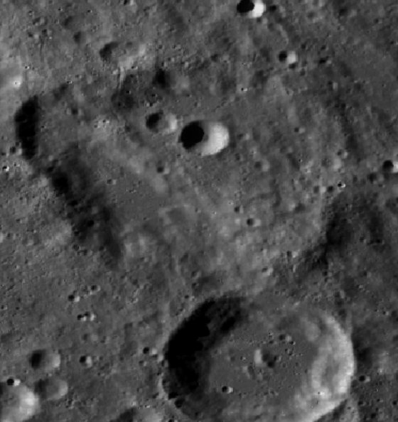 Cráter lunar Young. (Imagen LRO)